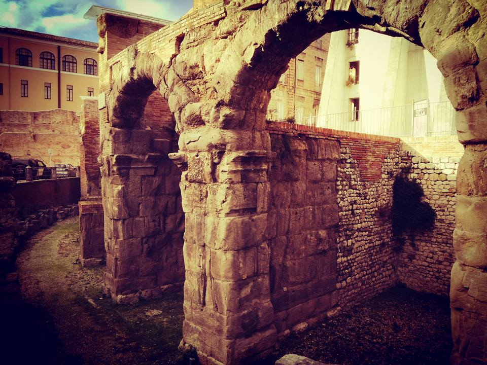 Teatro romano di Teramo